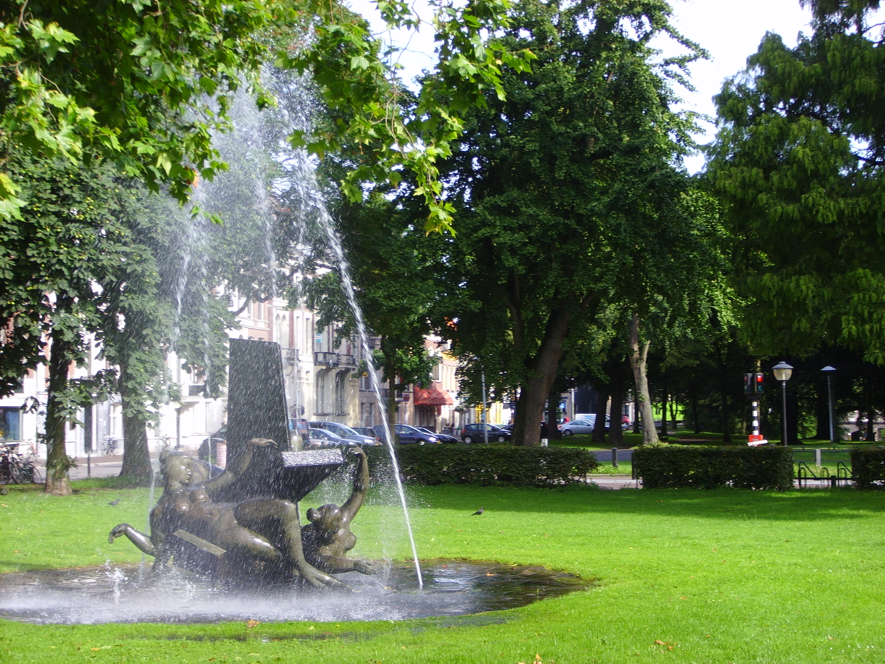 Feest der Muzen, beeldenpartij met fontein voor de Utrechtse Stadsschouwburg aan het Lucasbolwerk